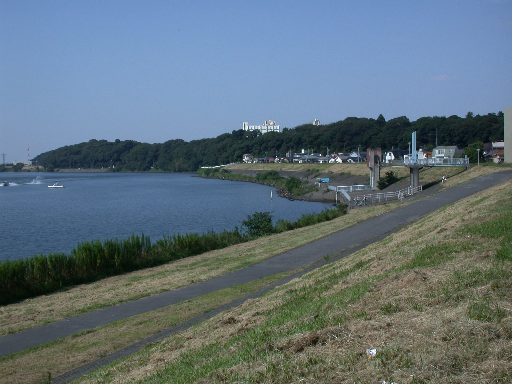 Konodai Castle